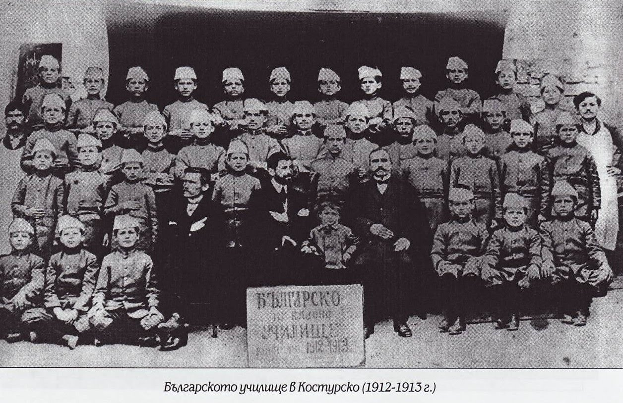 Българското училище в Костур 1912 - 1913.